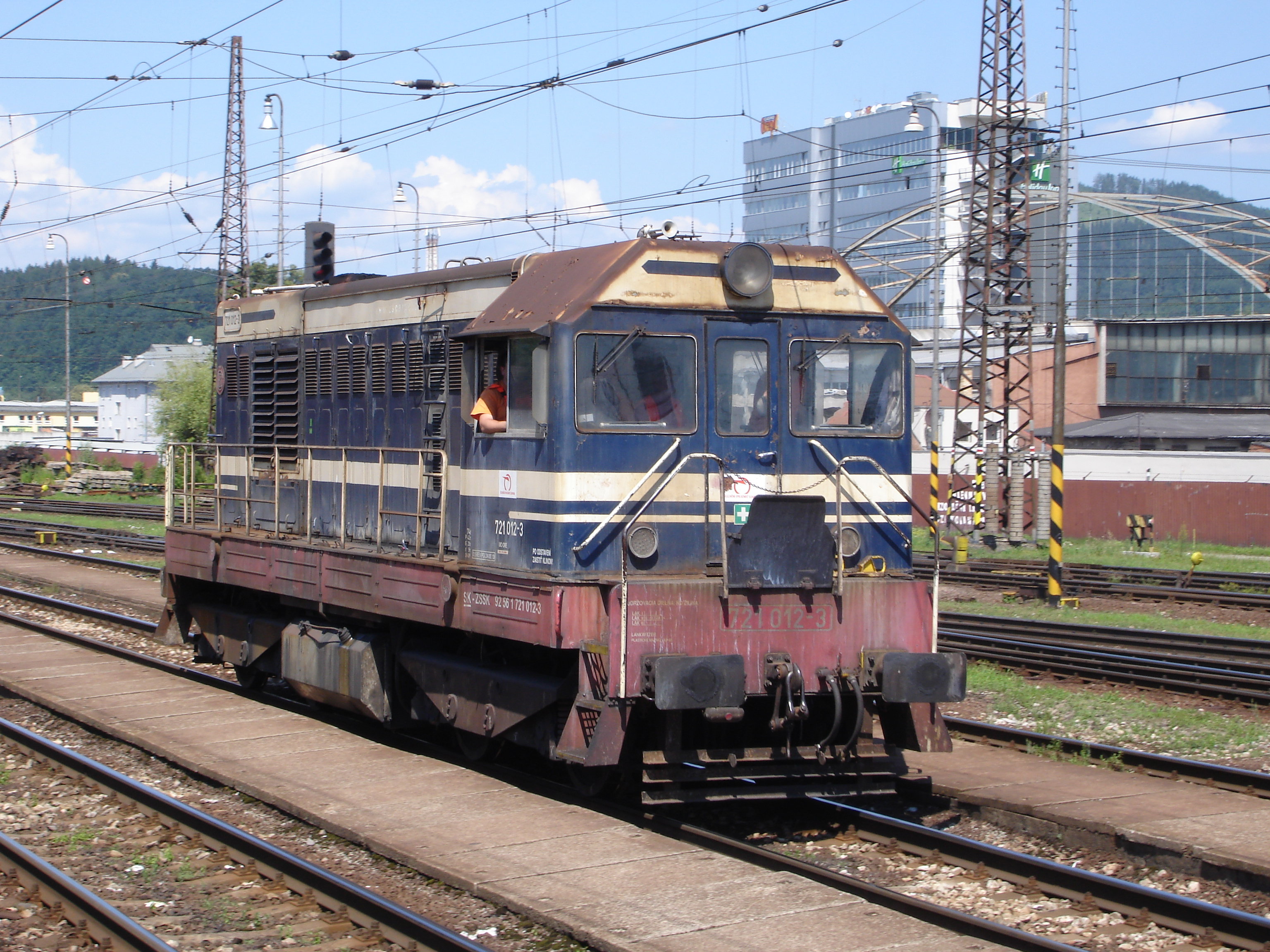 Diesellokomotive der ZSSK-Baureihe 721 in Žilina, Slowakei